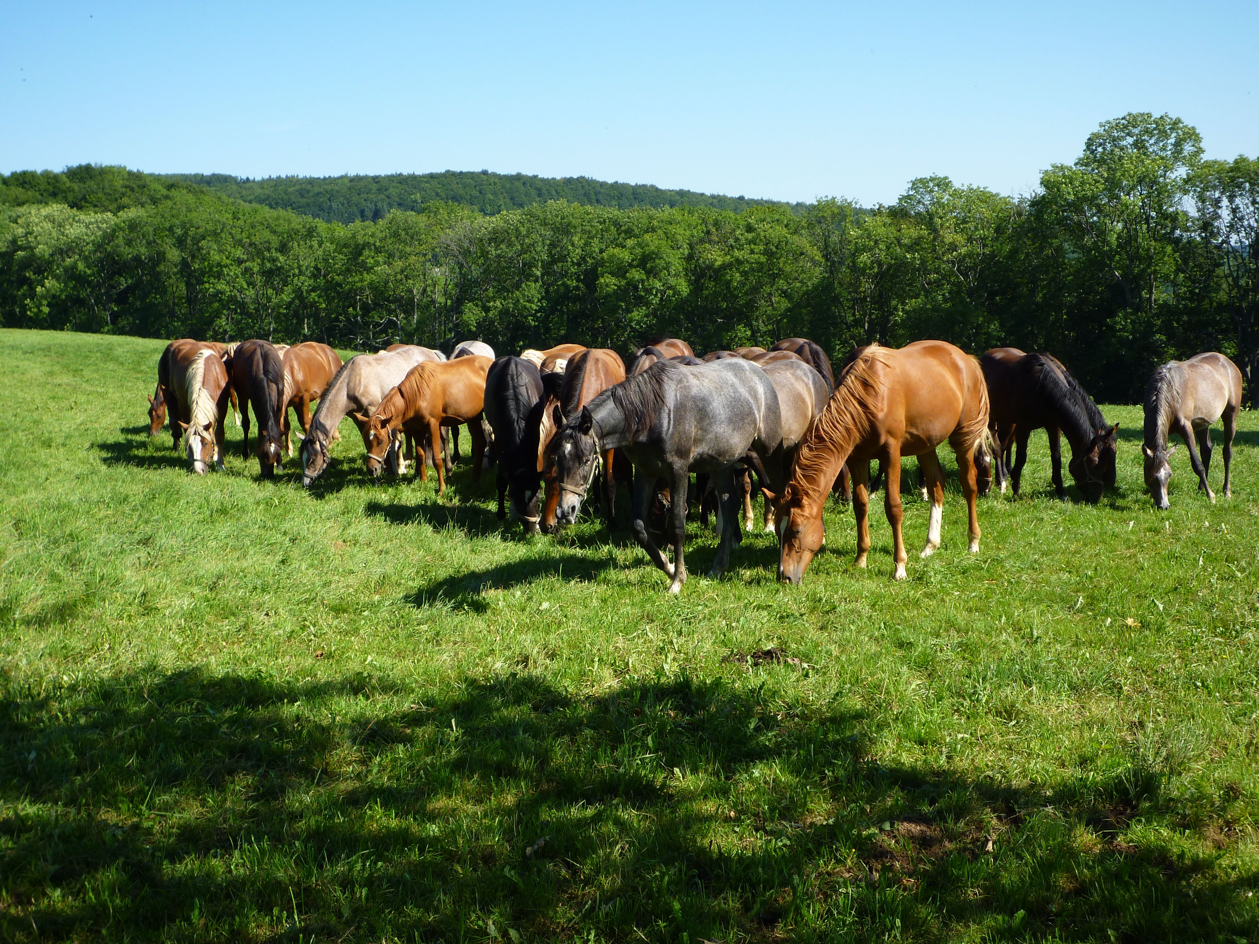 Sankt Johann - Jährlinge auf dem Fohlenhof .jpg